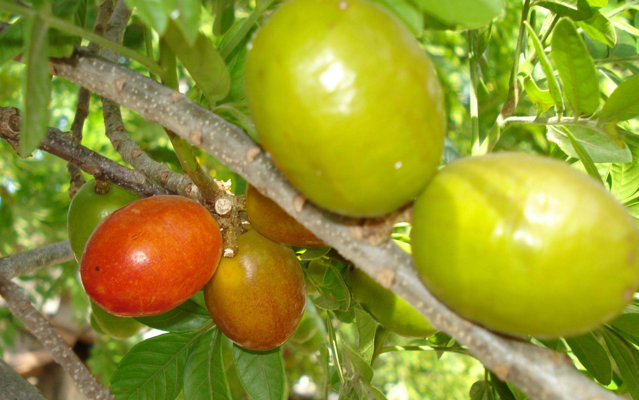 Foto de frutos de Seriguela (Spondias purpurea).